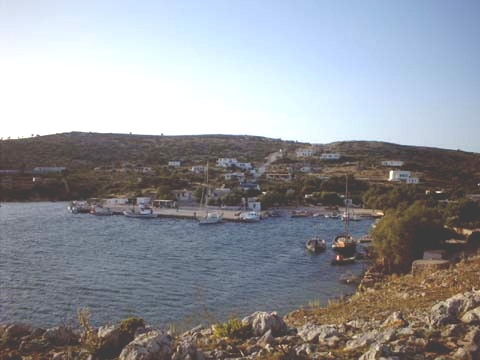 Arki Village